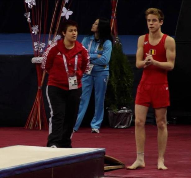 Jovanna Verheyen, Hugues Van Holderbeke.